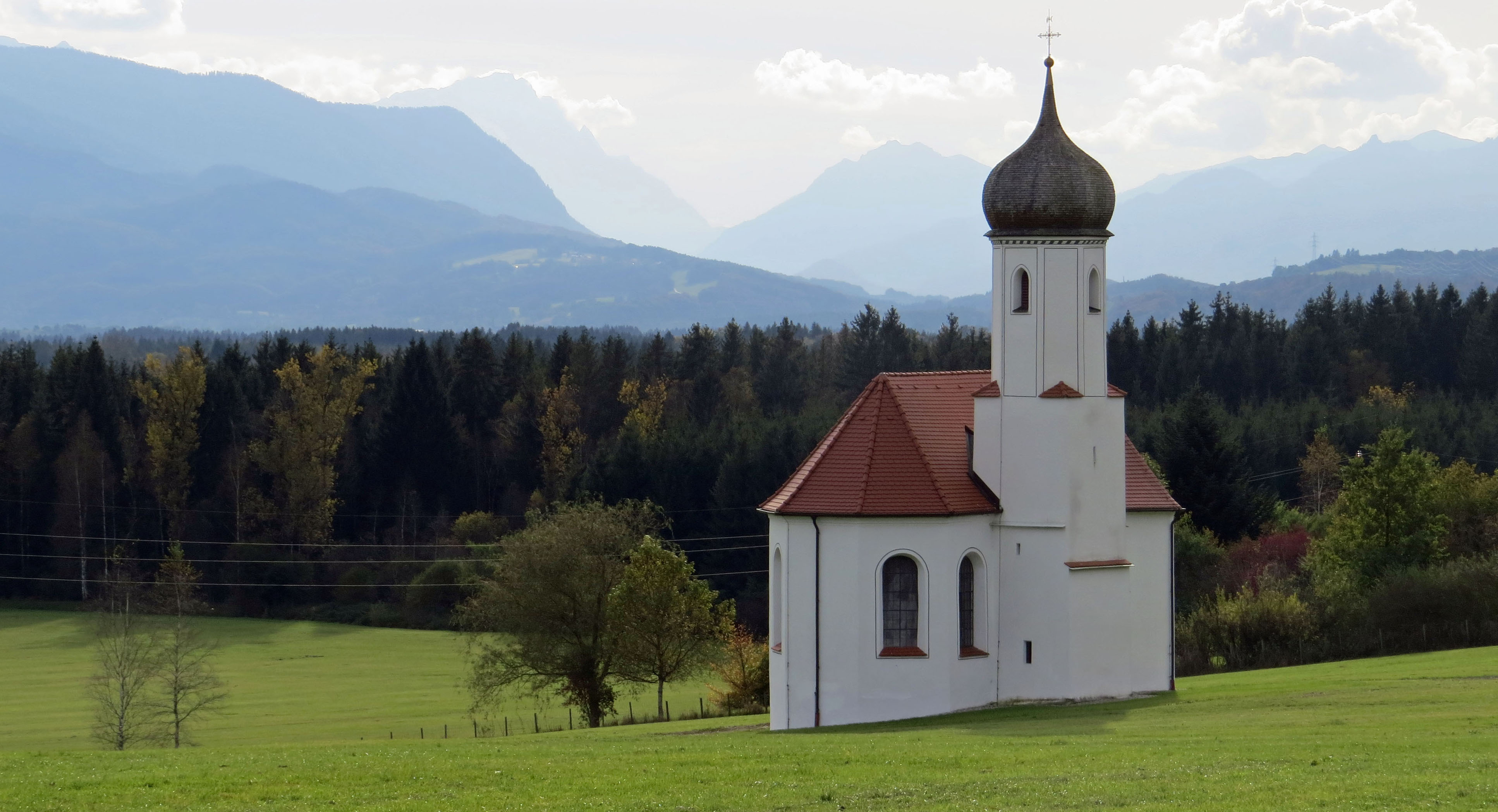 St. Johannisrain, Penzberg